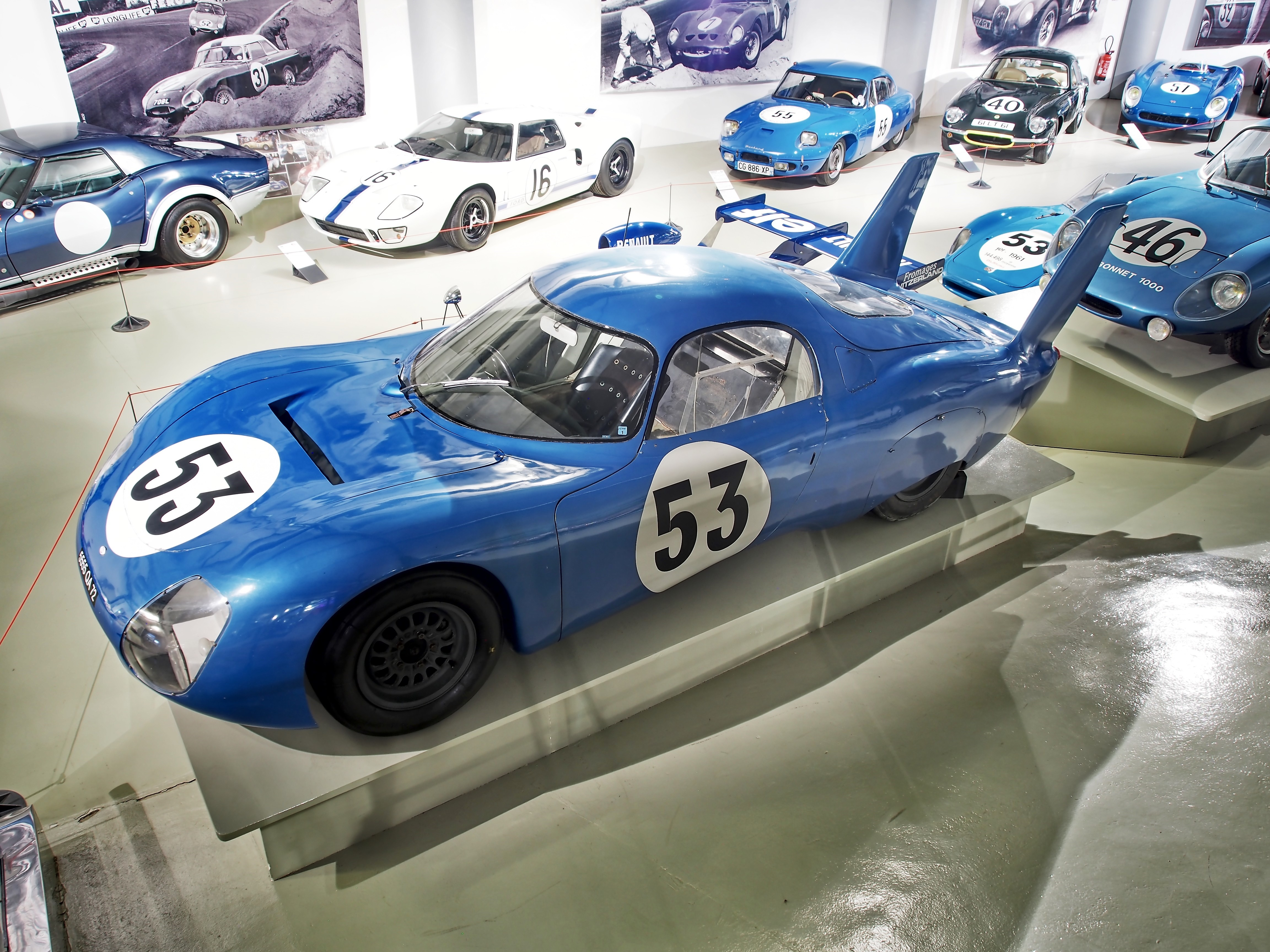 Photographed at Musée des 24 Heures du Mans, France.